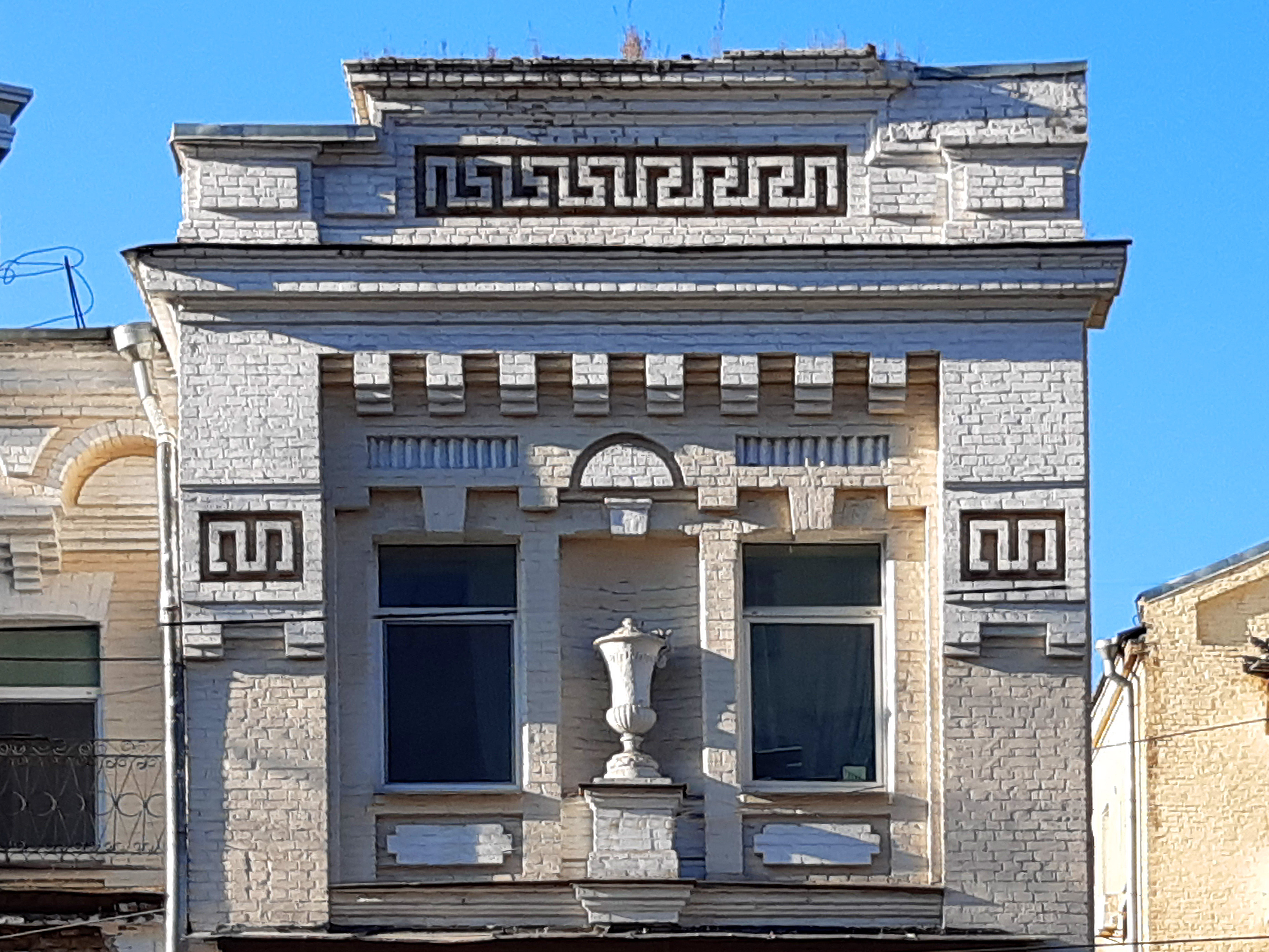 Декор. Жилий будинок, Київ, вул. Антоновича, 32